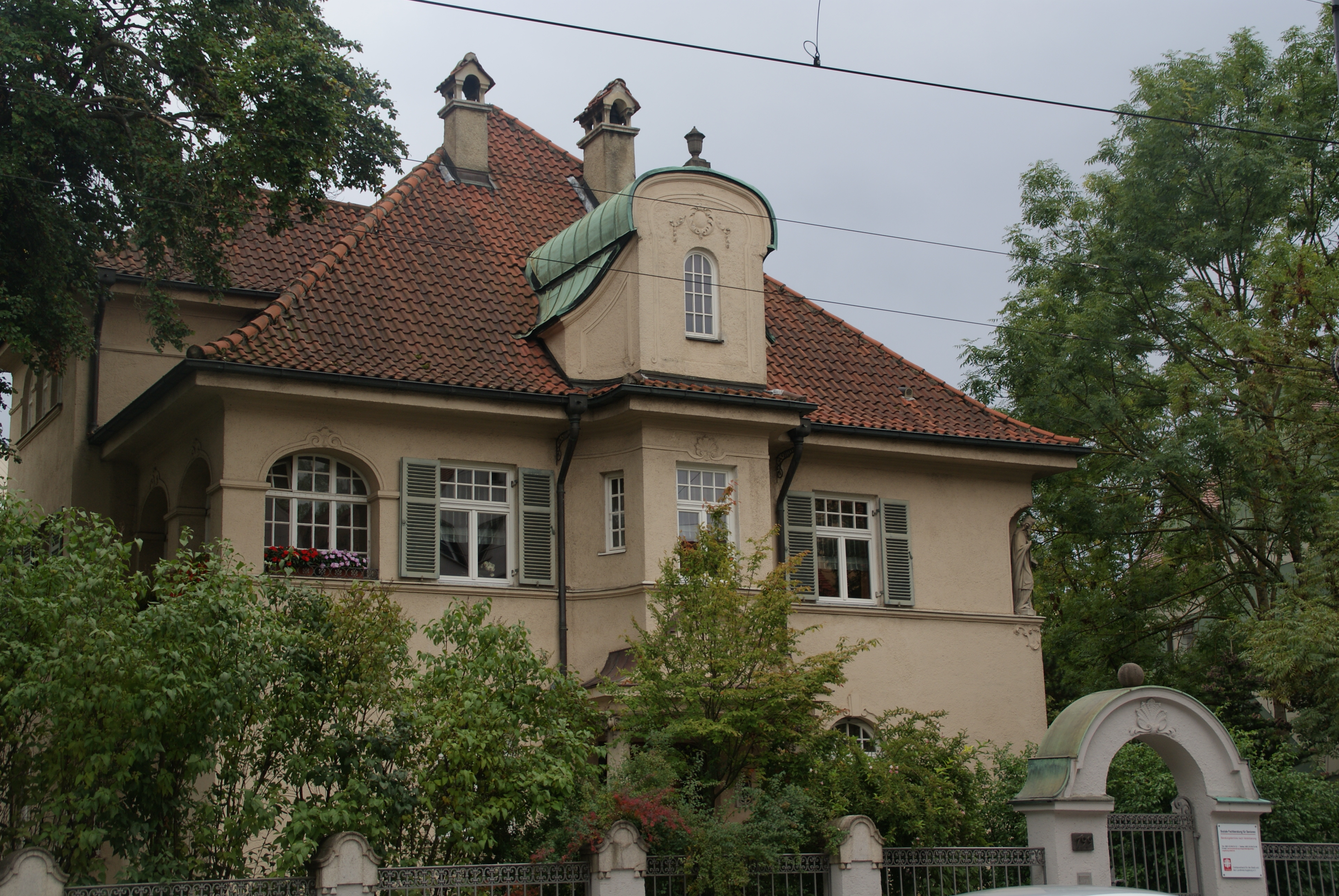 Pfarrhaus, Augsburg Kriegshaber This is a photograph of an architectural monument.